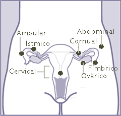 Ubicaciones del embarazo ectópico, vista frontal.[1]